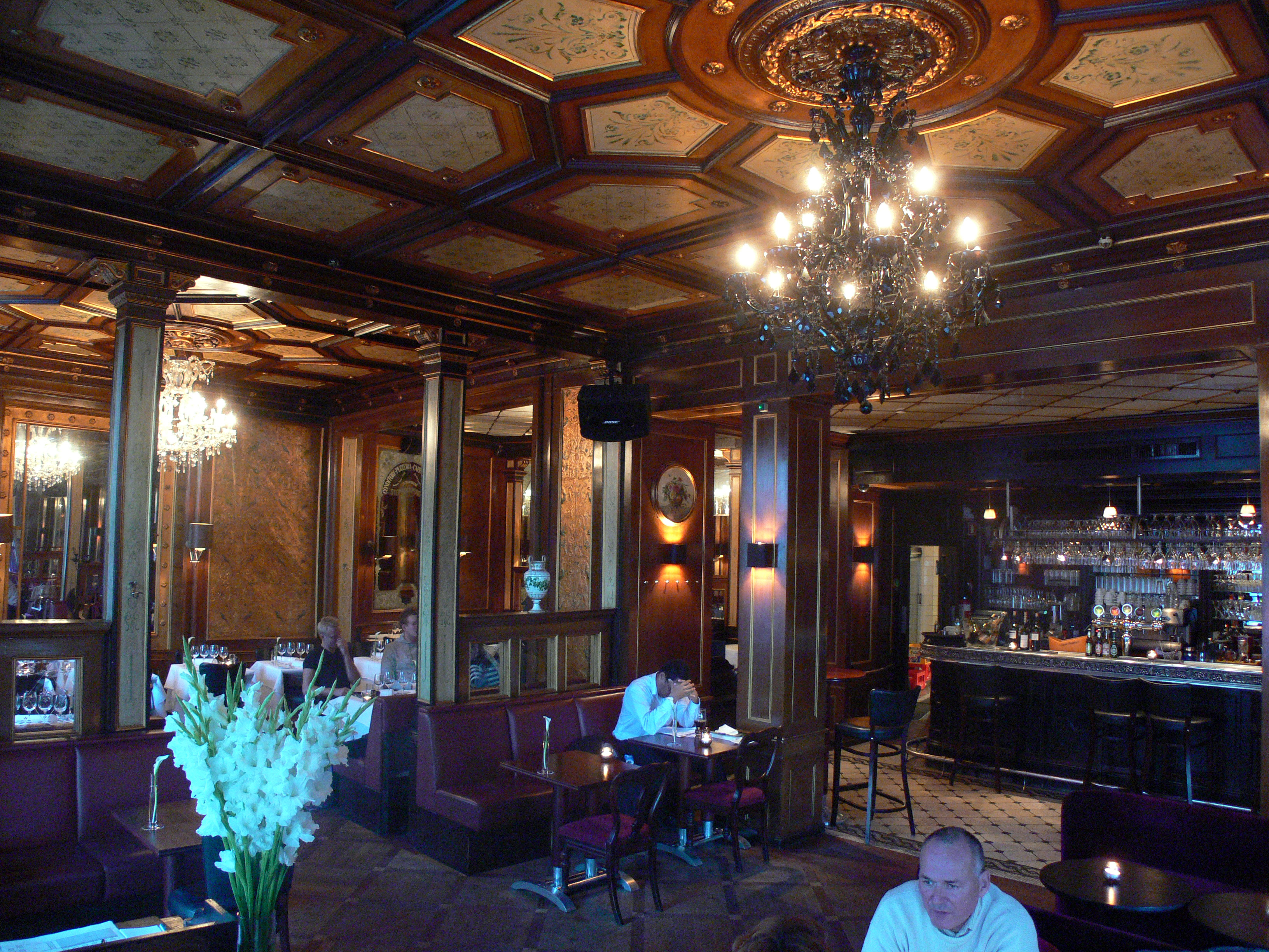 Café a Porta am Kongens Nytorv in Kopenhagen.